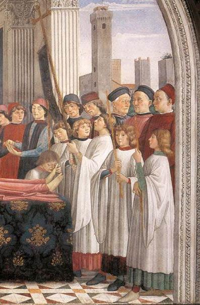 Messdiener auf dem Bild „Begräbnis der Heiligen Fina“ im Dom zu San Gimignano/Italien von Domenico Ghirlandaio (1475)